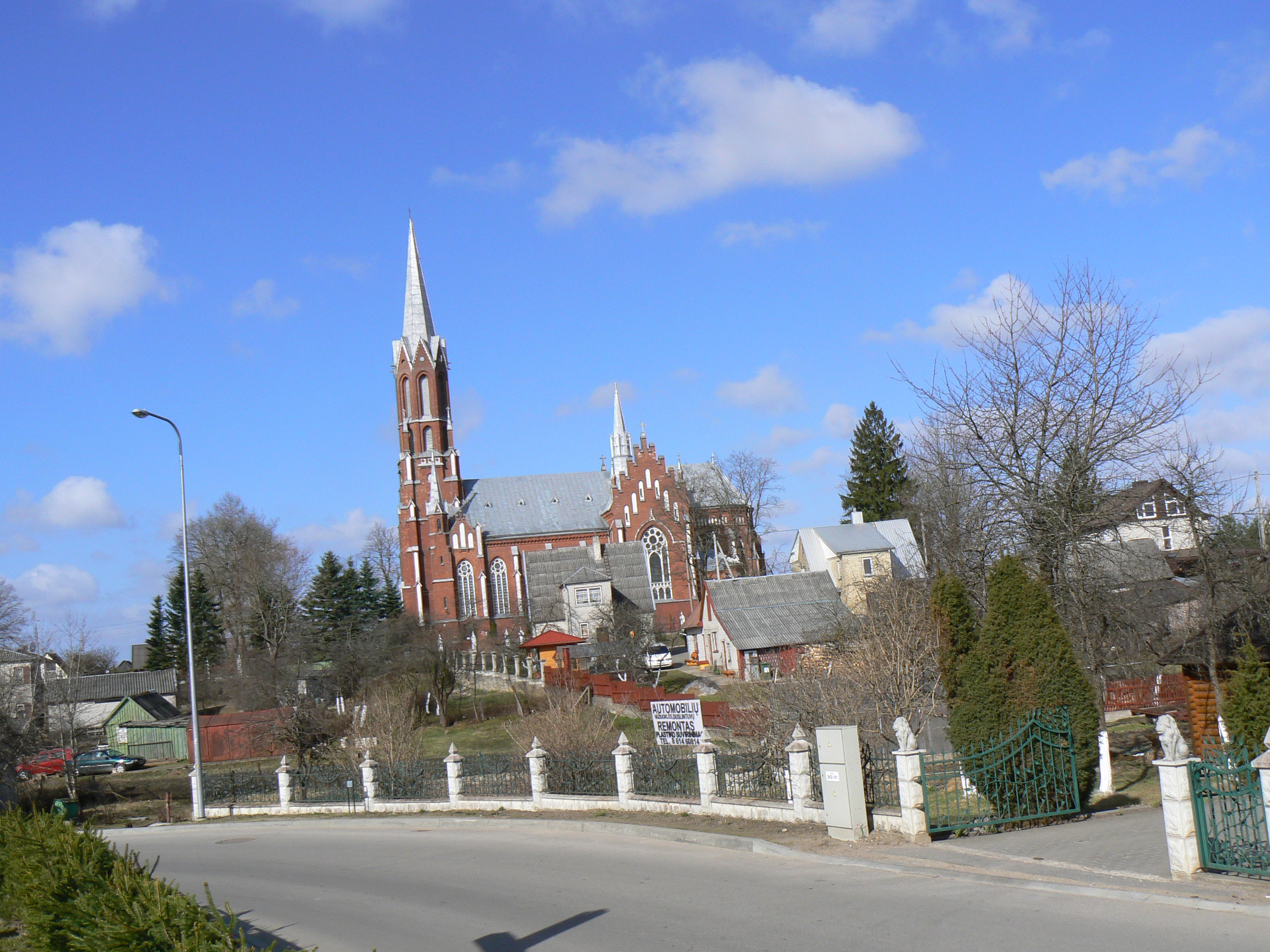 Kostel Svatého Pranciška Asyžietise v Šilalė. Pohled od hřbitova, t.j. od východu.